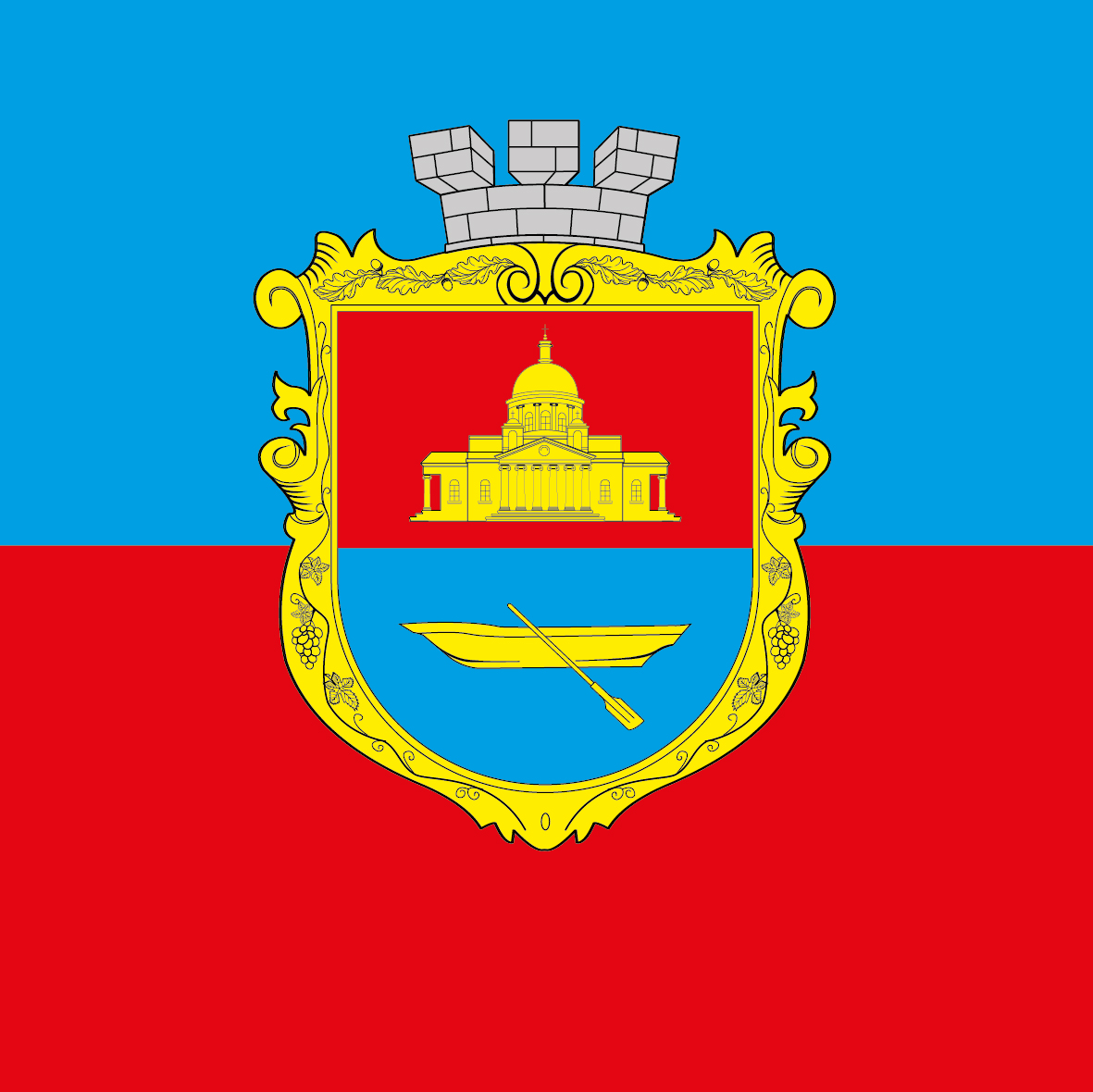 Прапор міста Болград, Одеська область, Україна